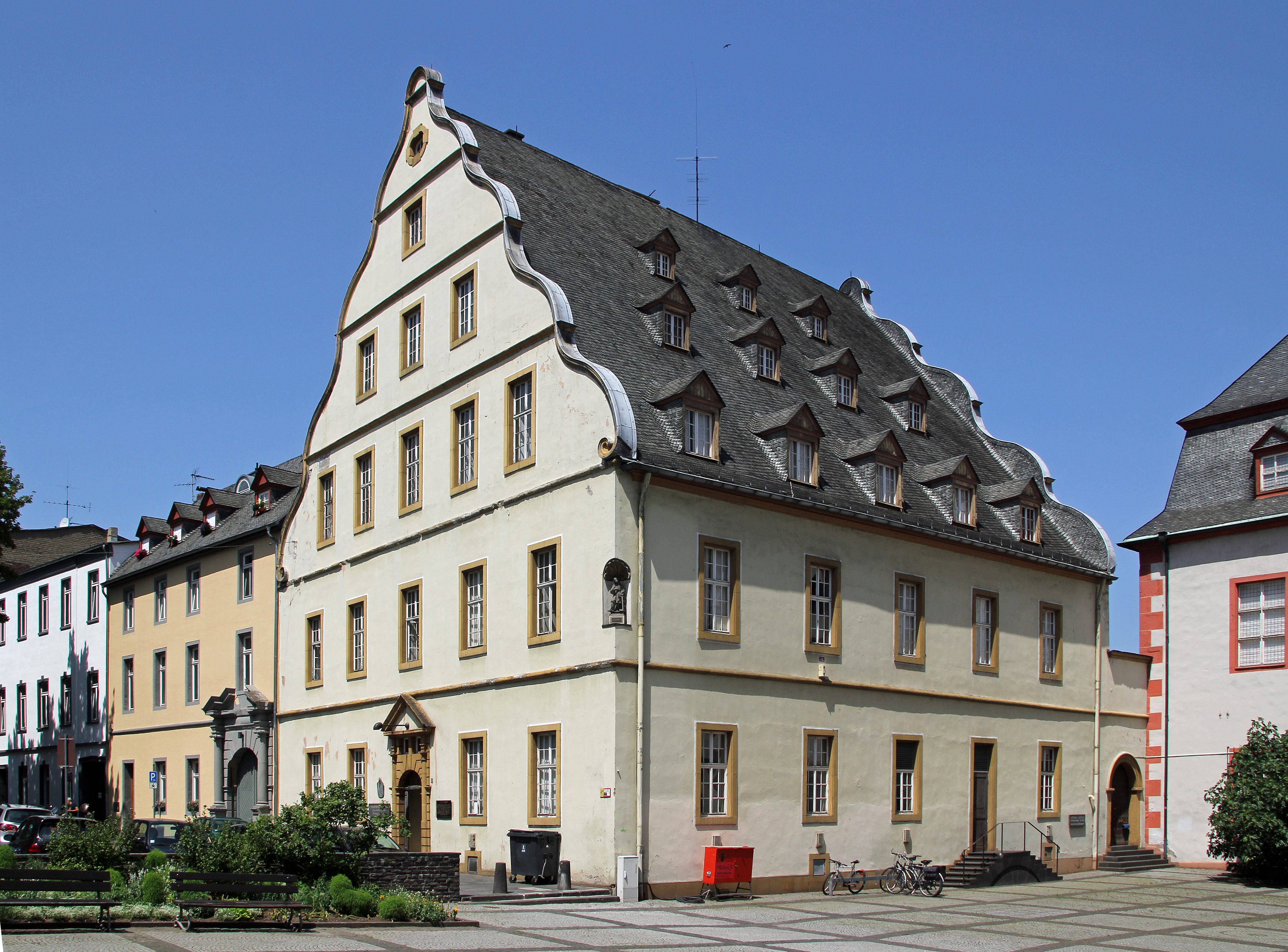 Koblenz im Buga-Jahr 2011 - Der Bürresheimer Hof